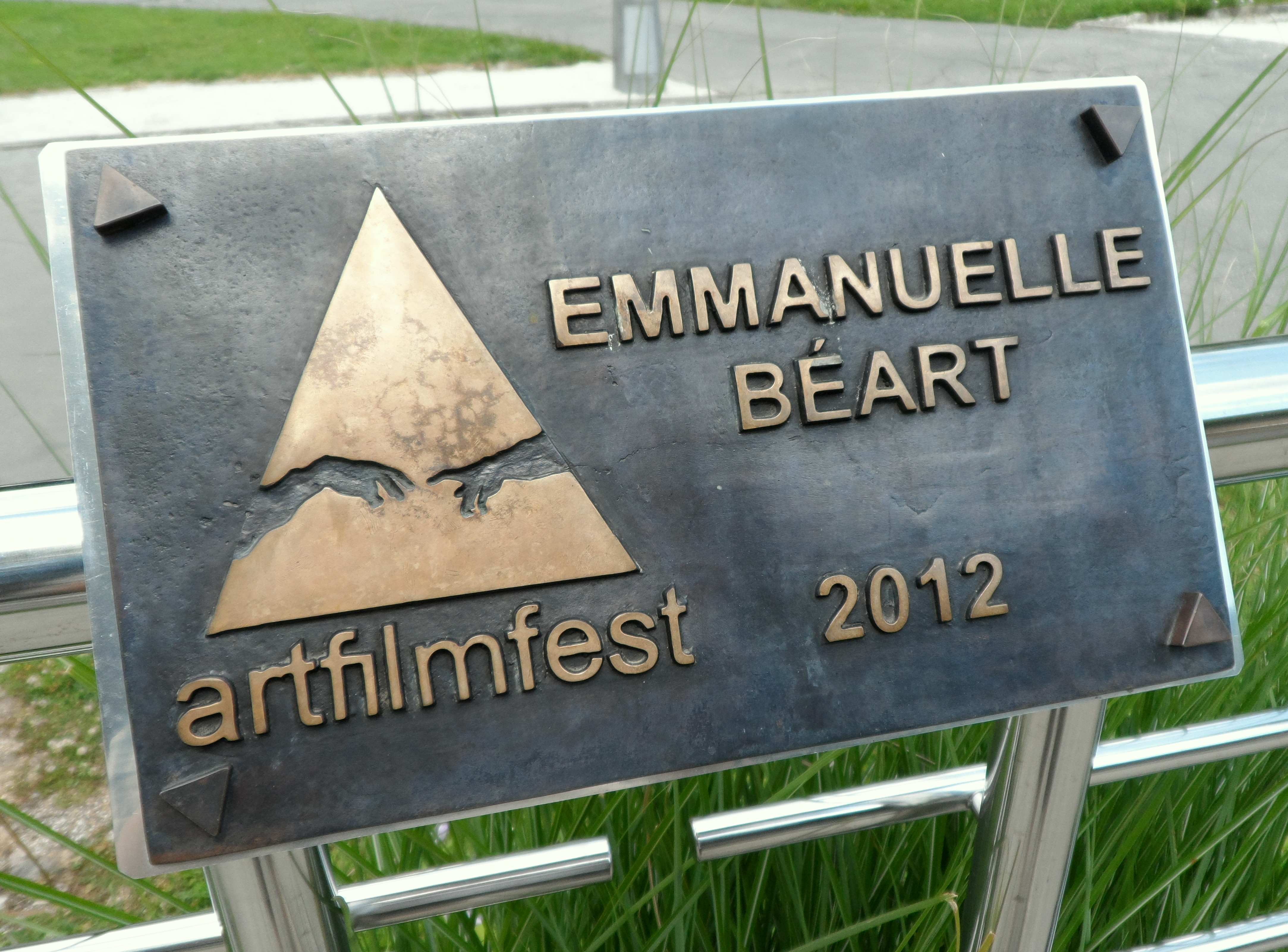 Mosadzná plaketa: „HERCOVA MISIA“ (Actor‘s Mission Award). Medzinárodný filmový festival Art Film Fest, Trenčianske Teplice 2012